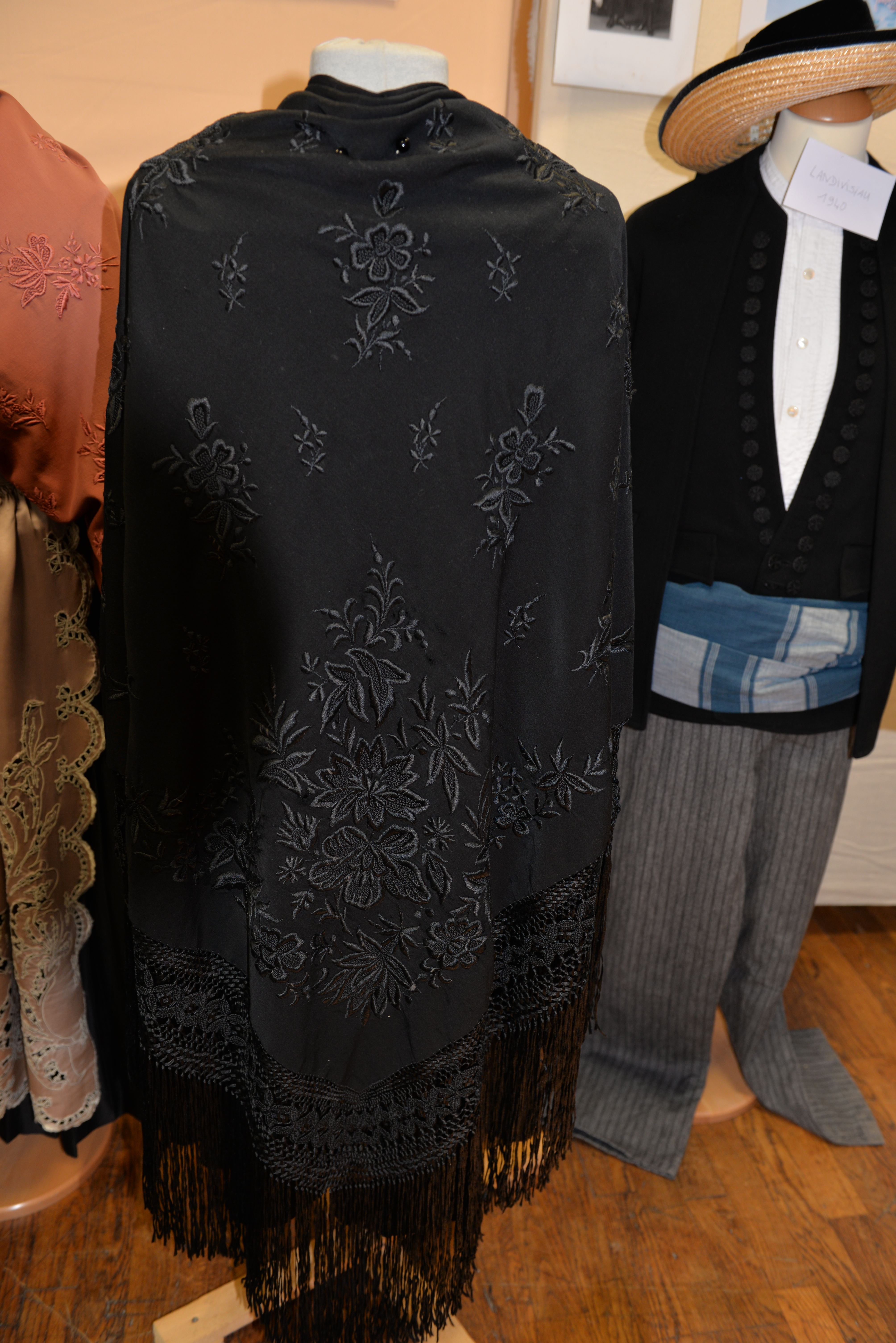 Costume de Landivisiau - Femme (de dos) - 1940